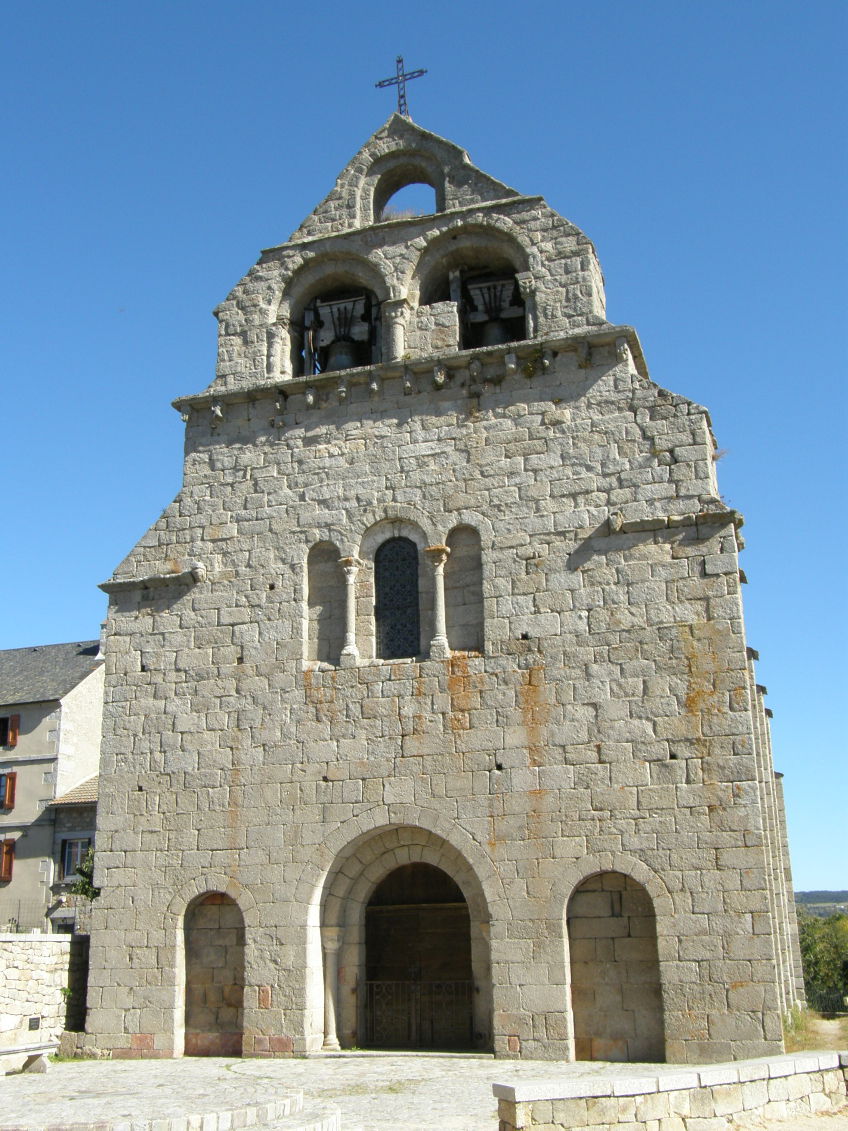 Façade de l'église Saint Caprais de Prunières en Lozère